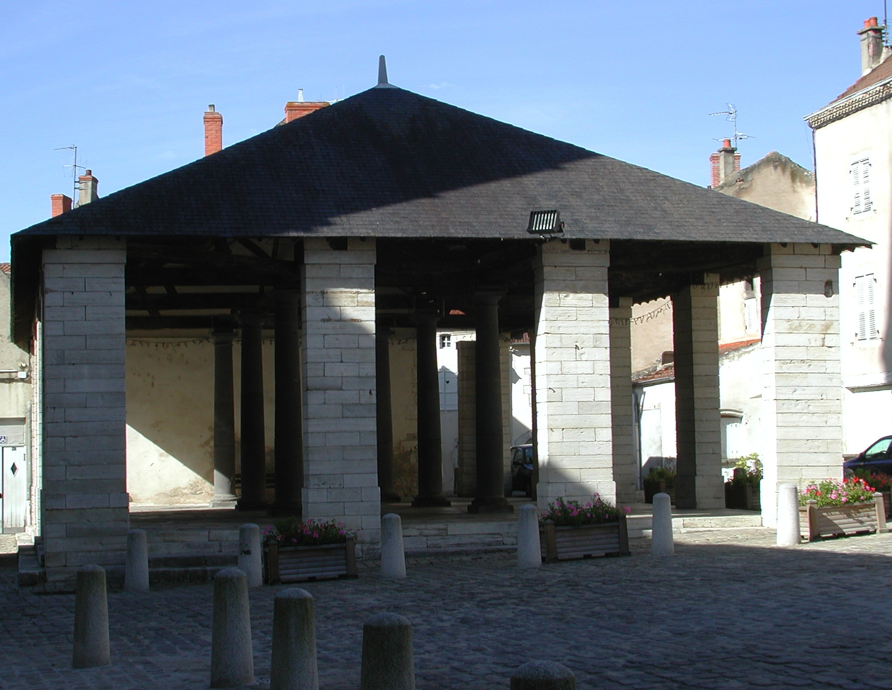 Construction du début du XIXe siècle, située sur la place de l'Église à Ébreuil (Allier, France). Inscrit M. H. (1971)